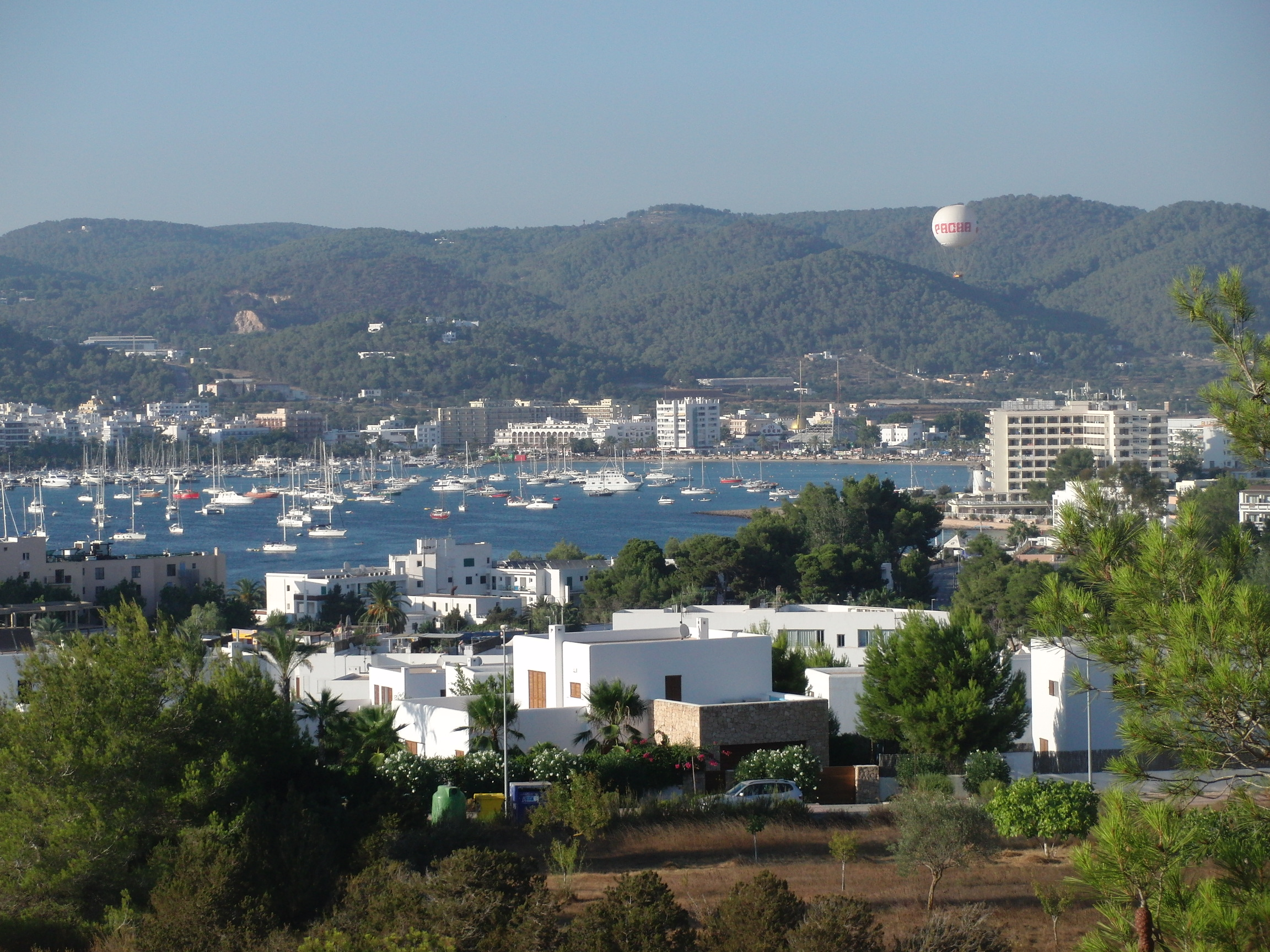 Ansicht der Bucht von Sant Antoni de Portmany, Ibiza, Spanien